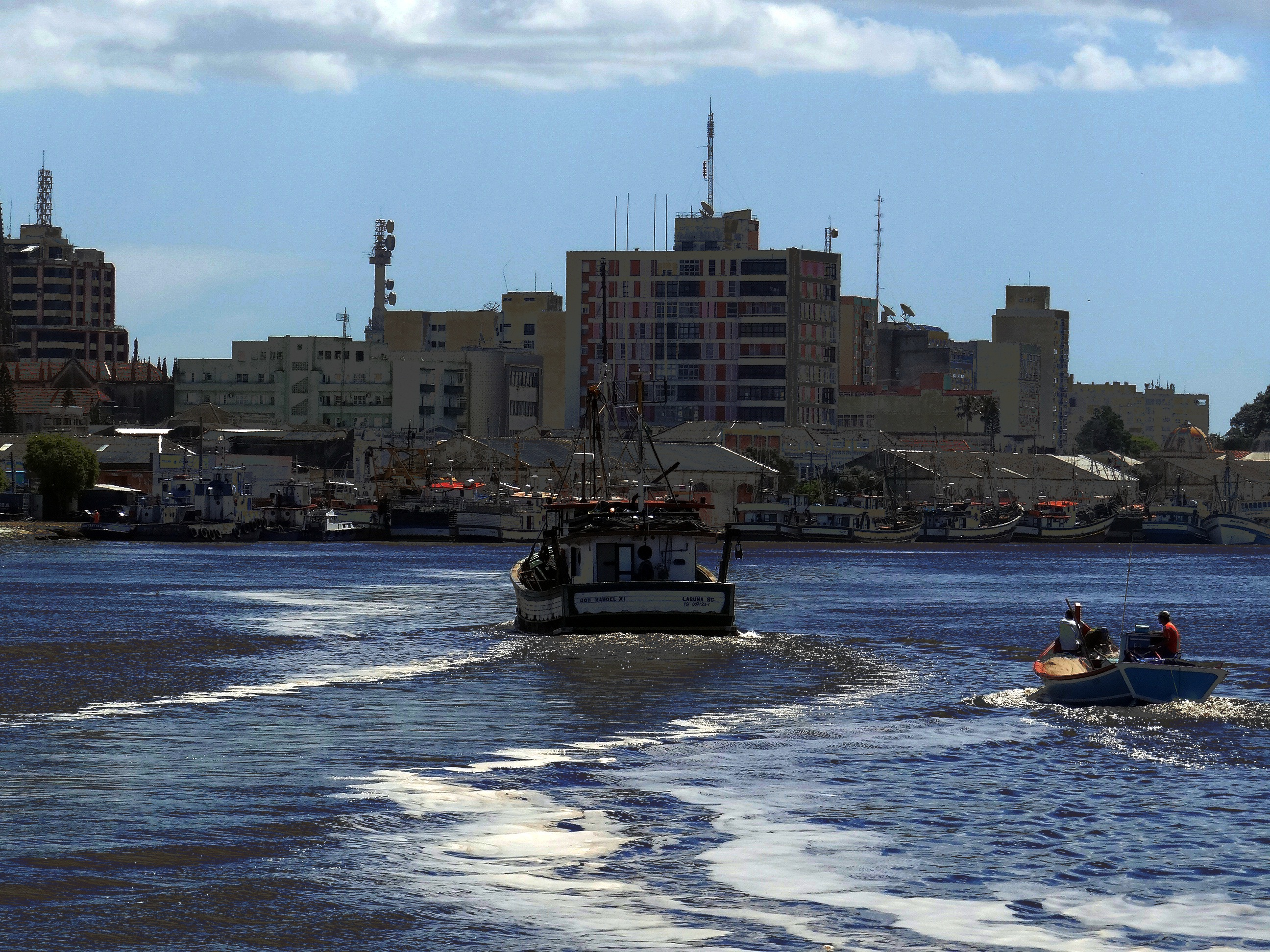 Visão da Lagoa dos Patos, para a Cidade do Rio Grande